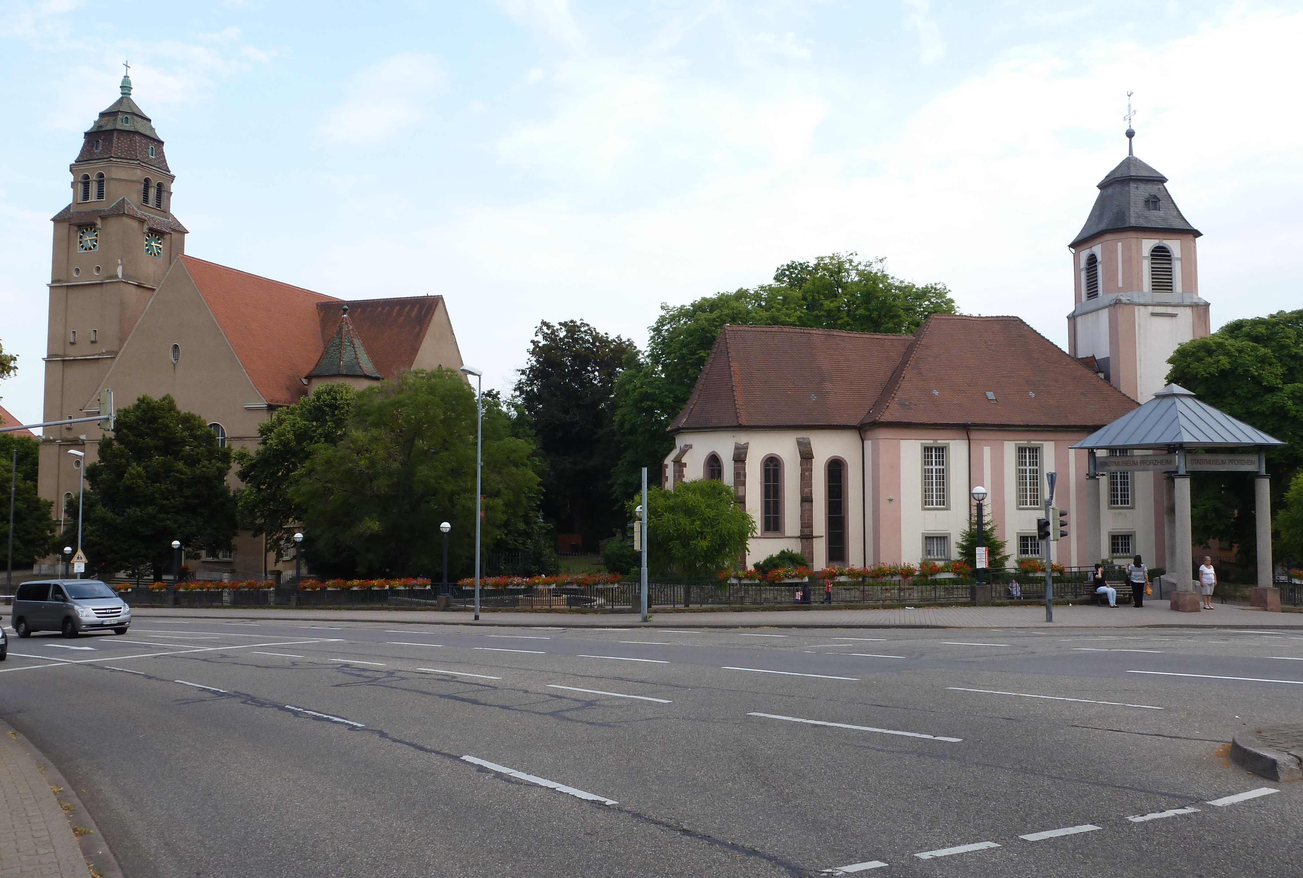 L’église du Christ et l’ancienne église St Martin.